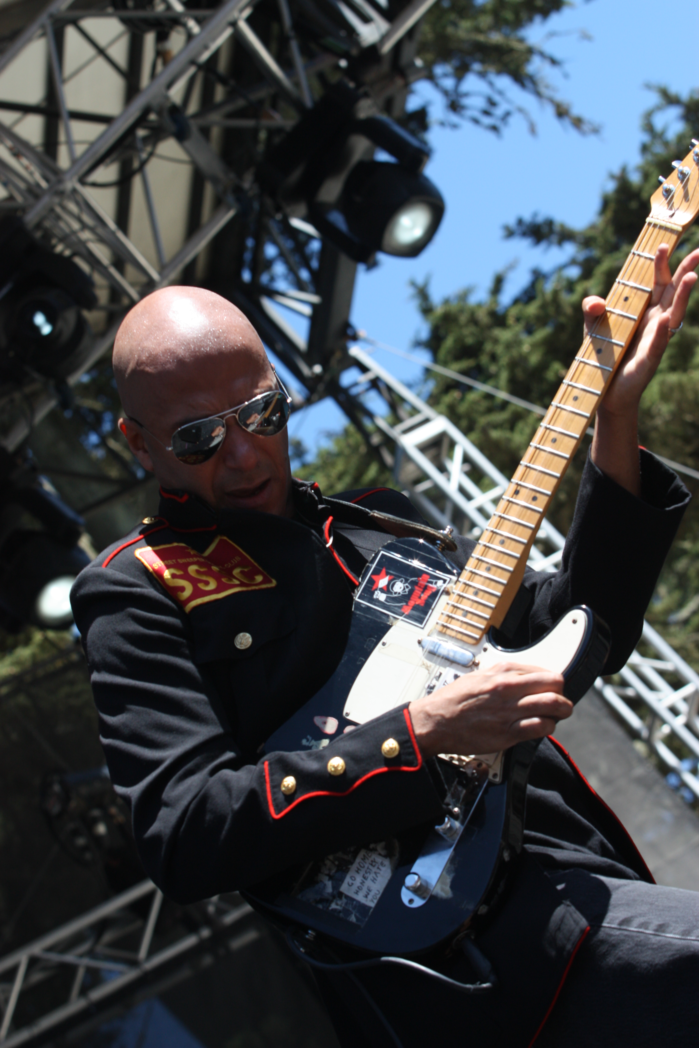 Tom Morello